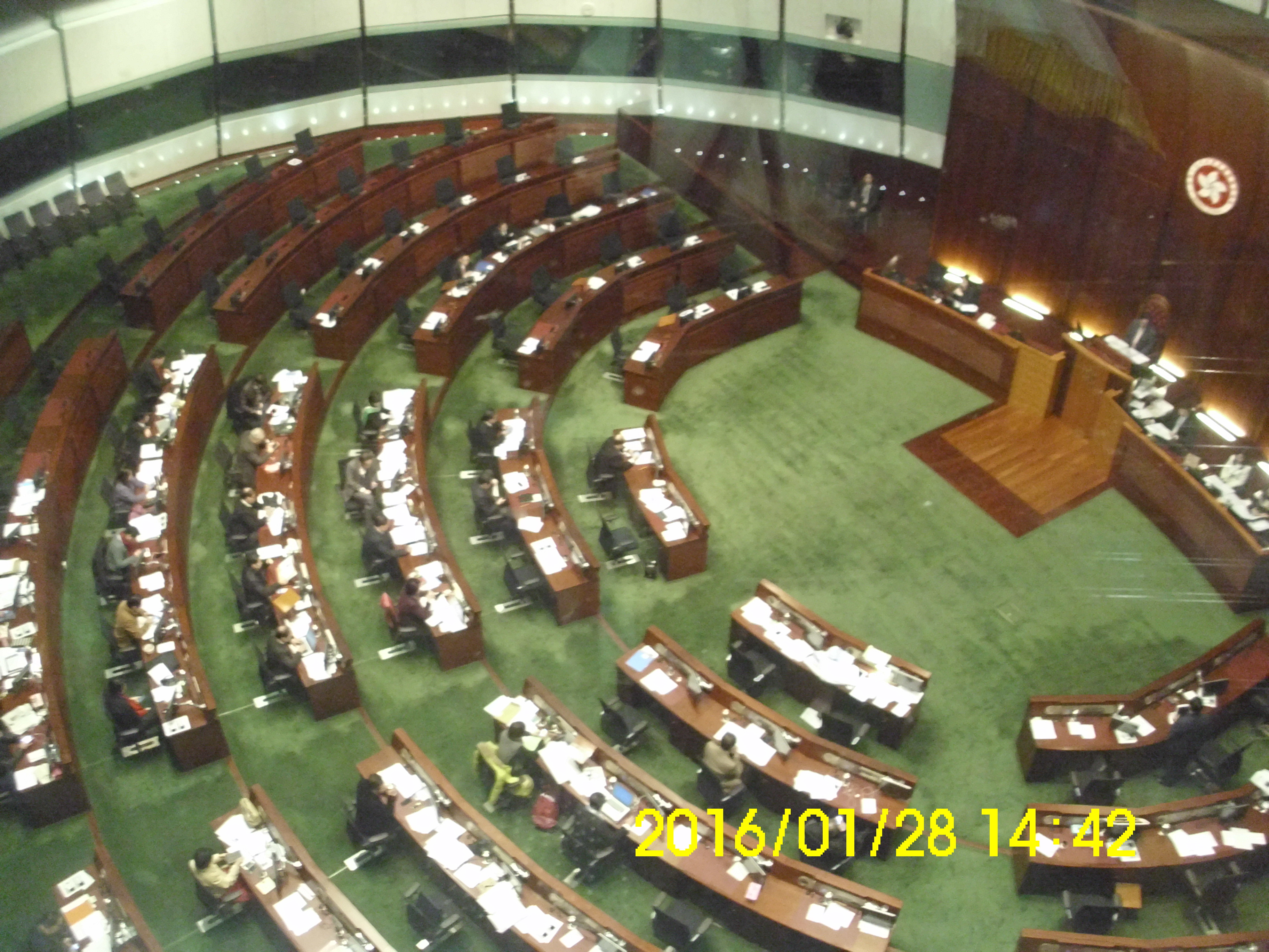 中文（中国大陆）: 原创作品，香港立法会